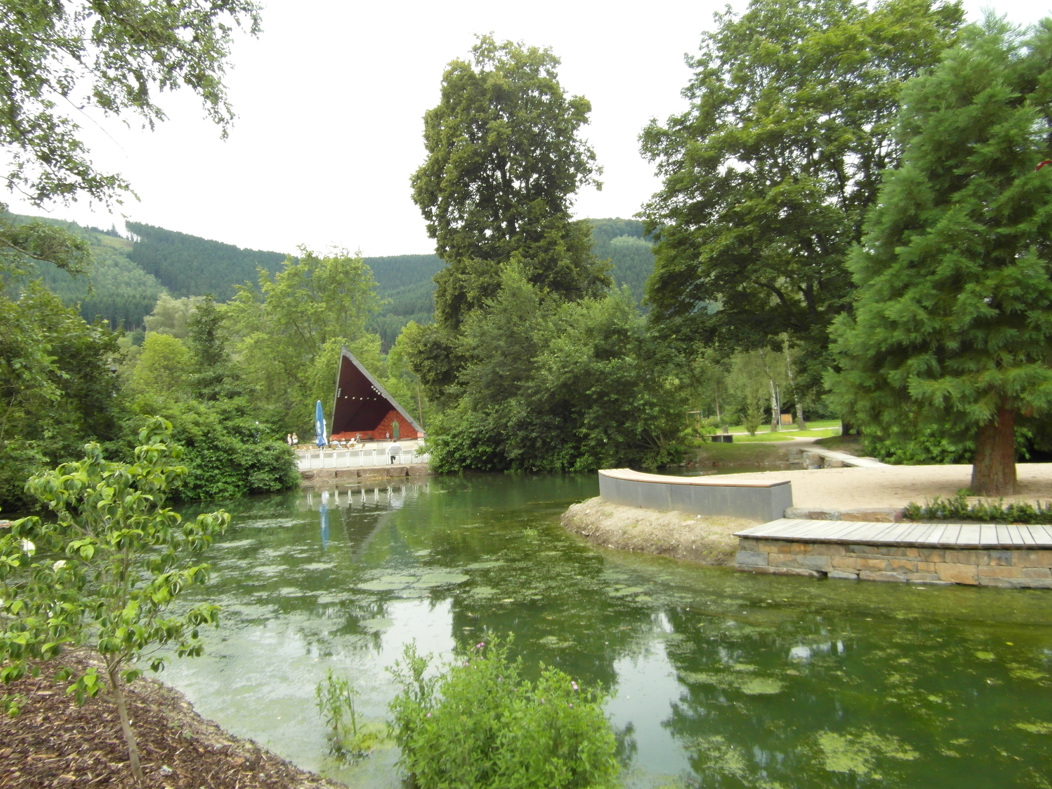 Blick auf den Konzertpavillon mit Teichanlage und Insel. Neuanlagen im Rahmen des Projektes "Lenneschiene" in den Jahren 2014/15